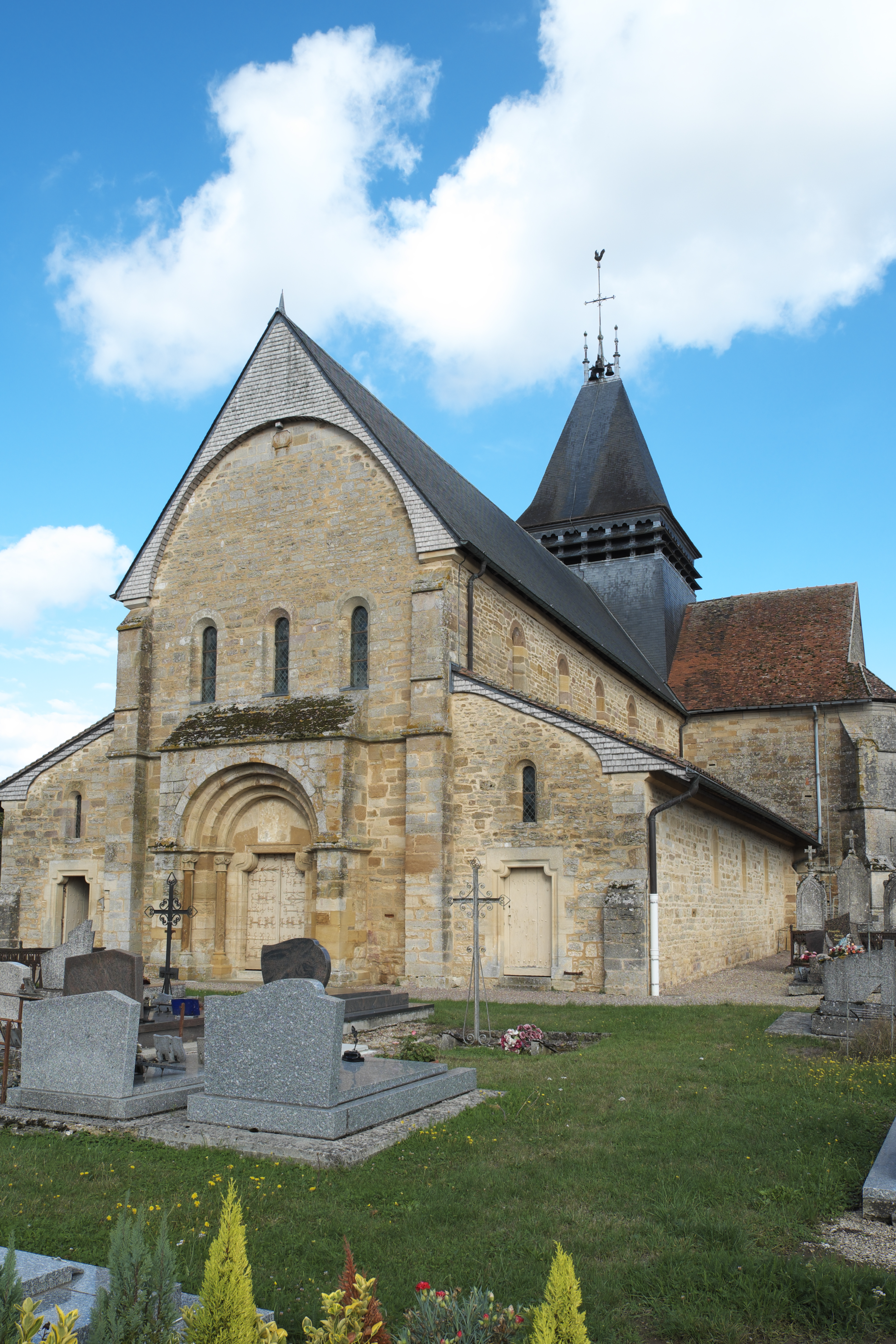 Katholische Kirche Notre-Dame-de-l'Assomption in Droyes im Département Haute-Marne (Champagne-Ardenne/Frankreich) .